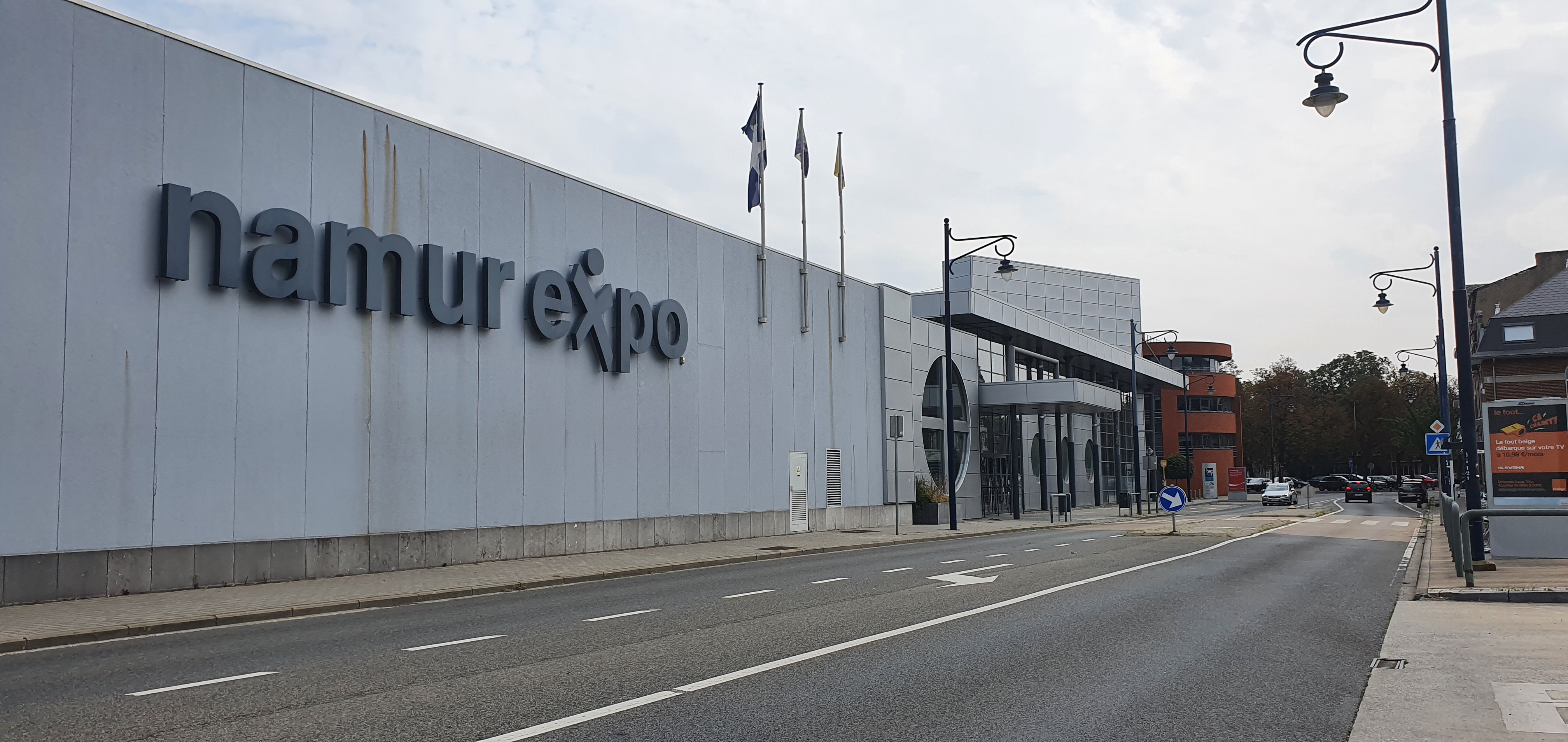 Palais des expositions de Namur